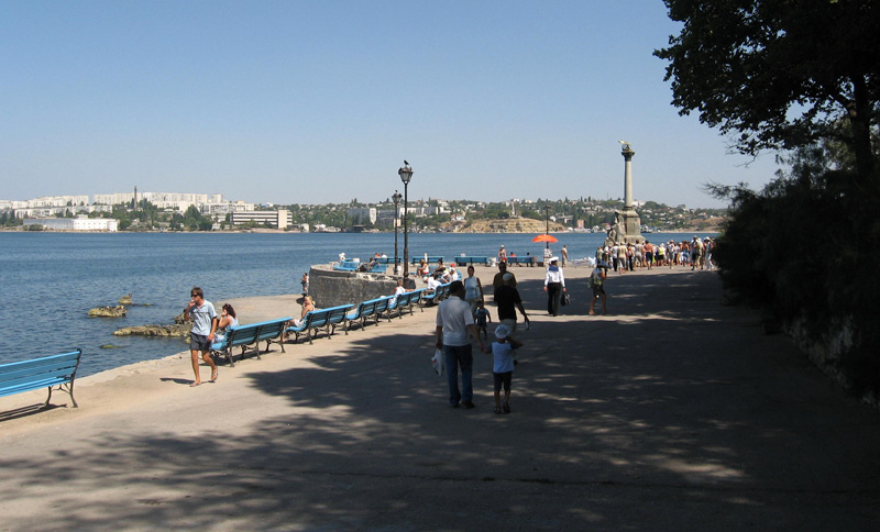 Primorski boulevard in Sevastopol